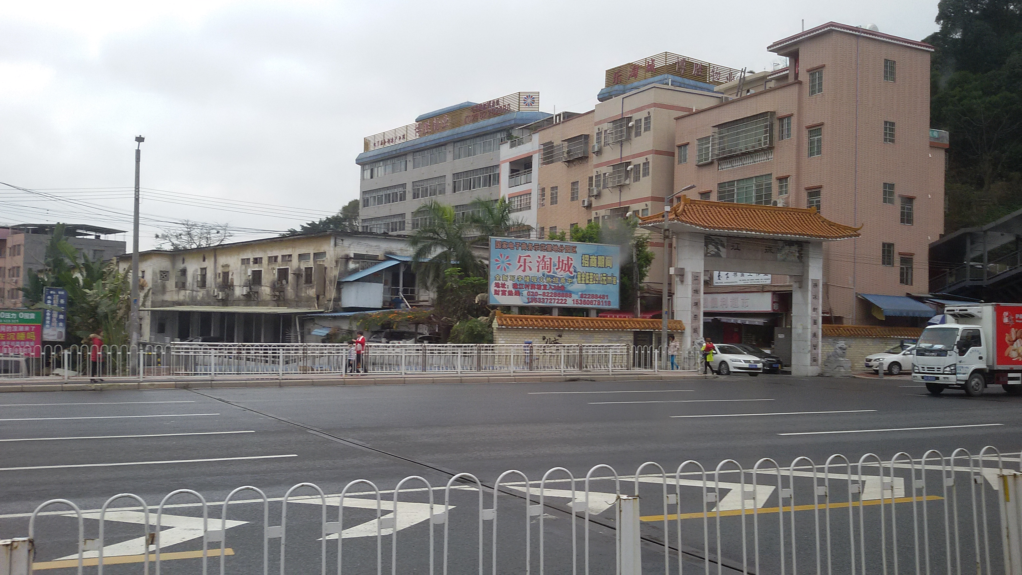 粵語: 廣州市黃埔區珠江村北邊嘅牌坊